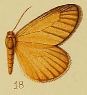 Thermochrous stenocraspis